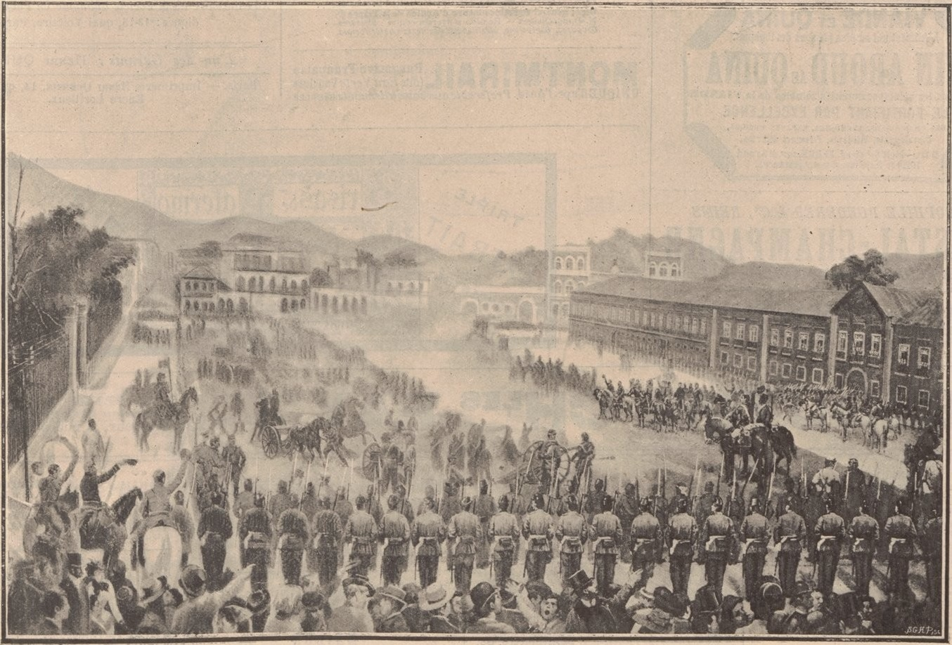 BRÉSIL: Document officiel de la proclamation de la République, devant le Quartier Général de Rio de Janeiro (d'après une photographie).